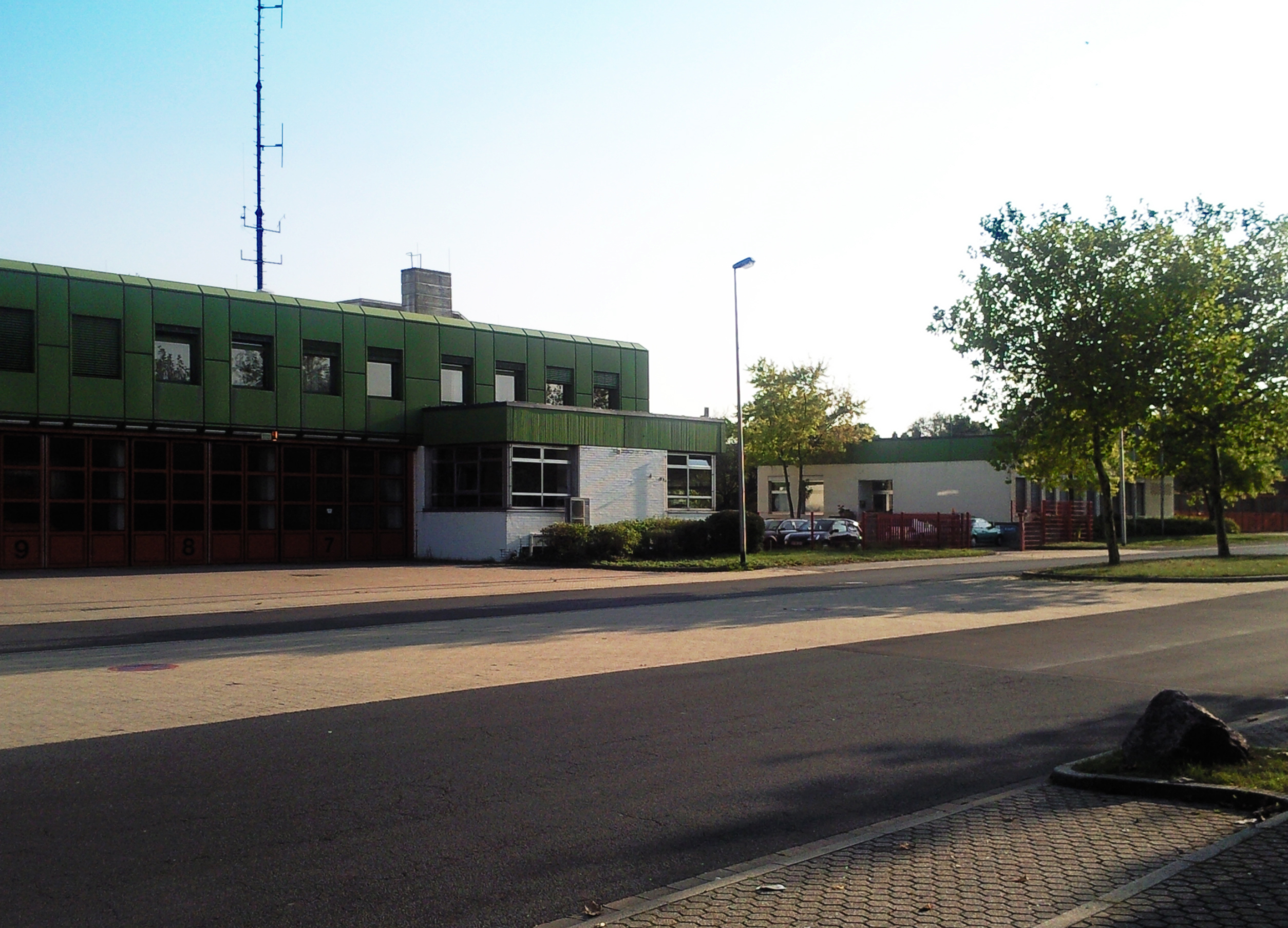 Hauptwache_Düren-Sued